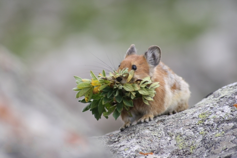 Un pika roux adulte amenant des matériaux fraichement coupés vers son terrier.